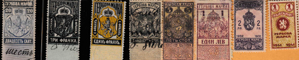 Гербови марки на Княжество България и Царство България за заплащане на нотариални и други съдебни такси